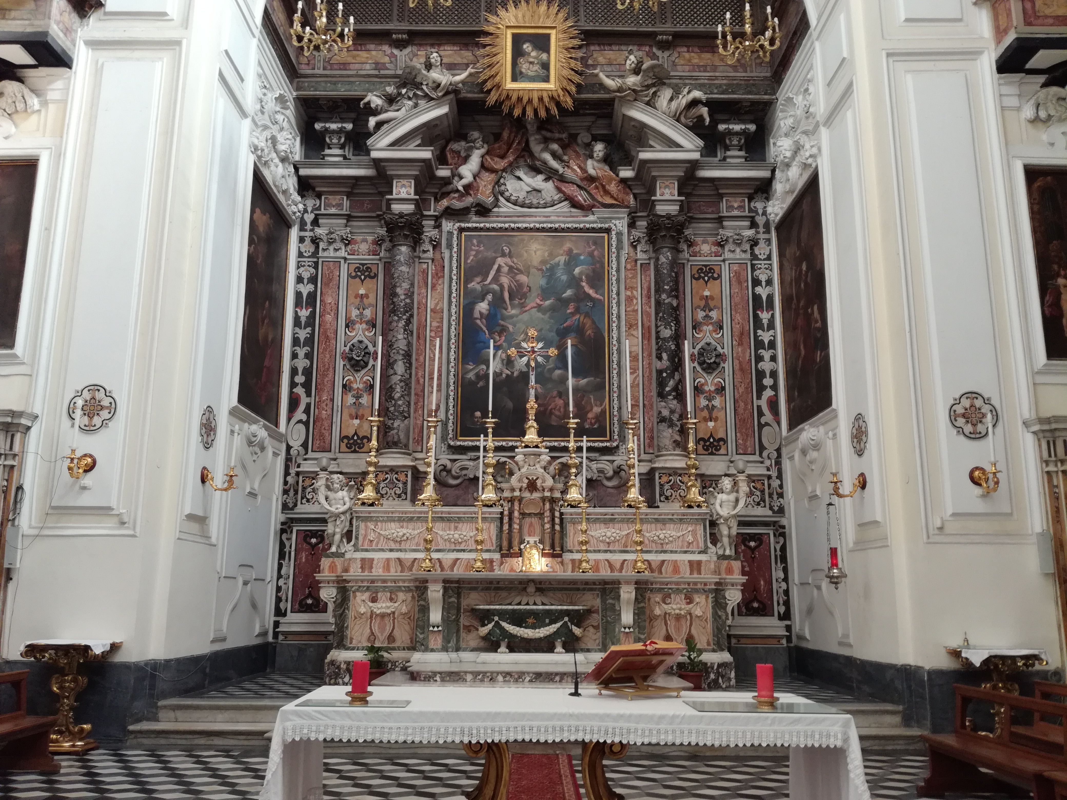 Altare, Santa Maria dei Miracoli (Napoli)